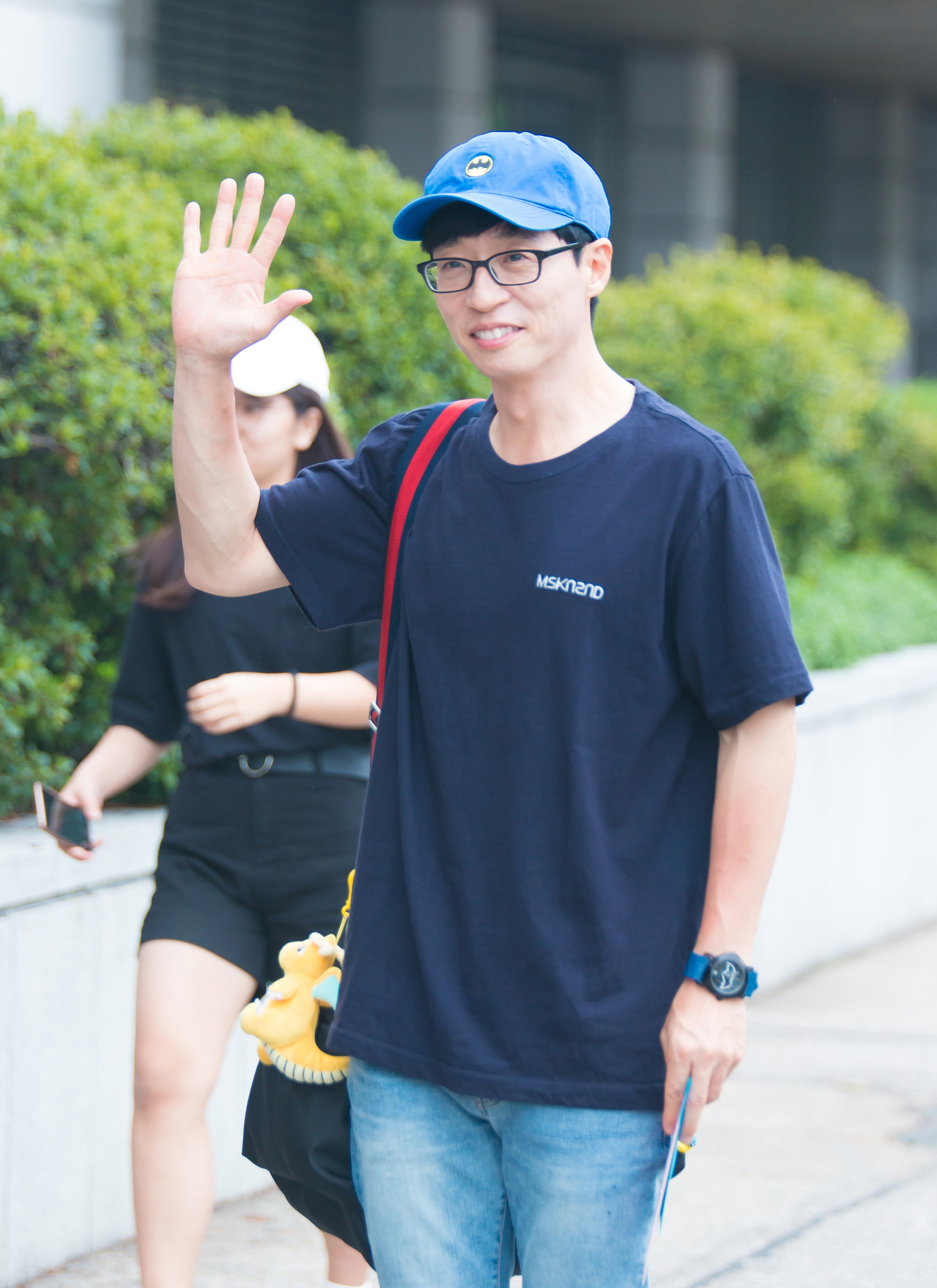 20170819 해피투게더 출근길 유재석